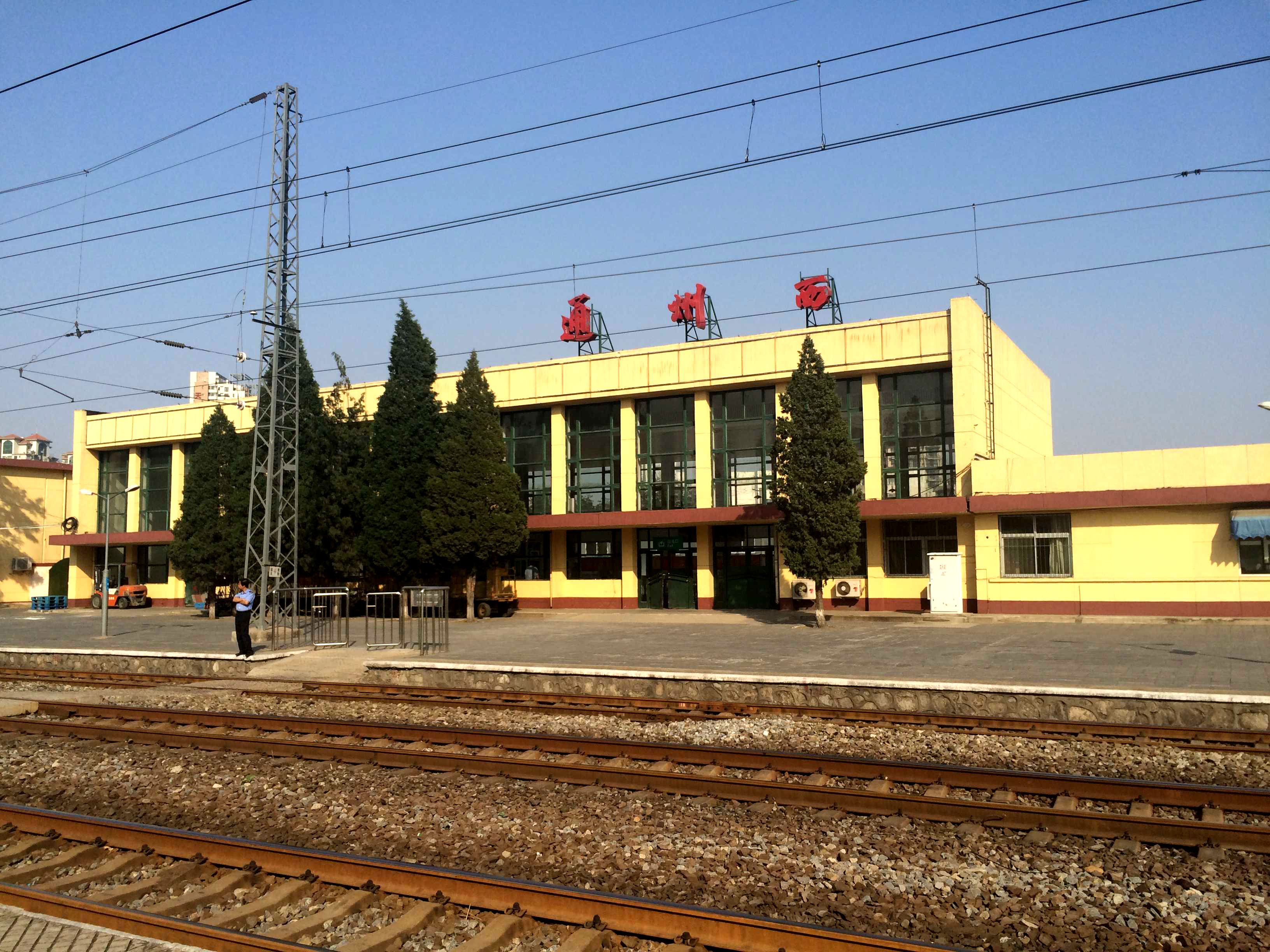 通州西站站房，摄于2015年。